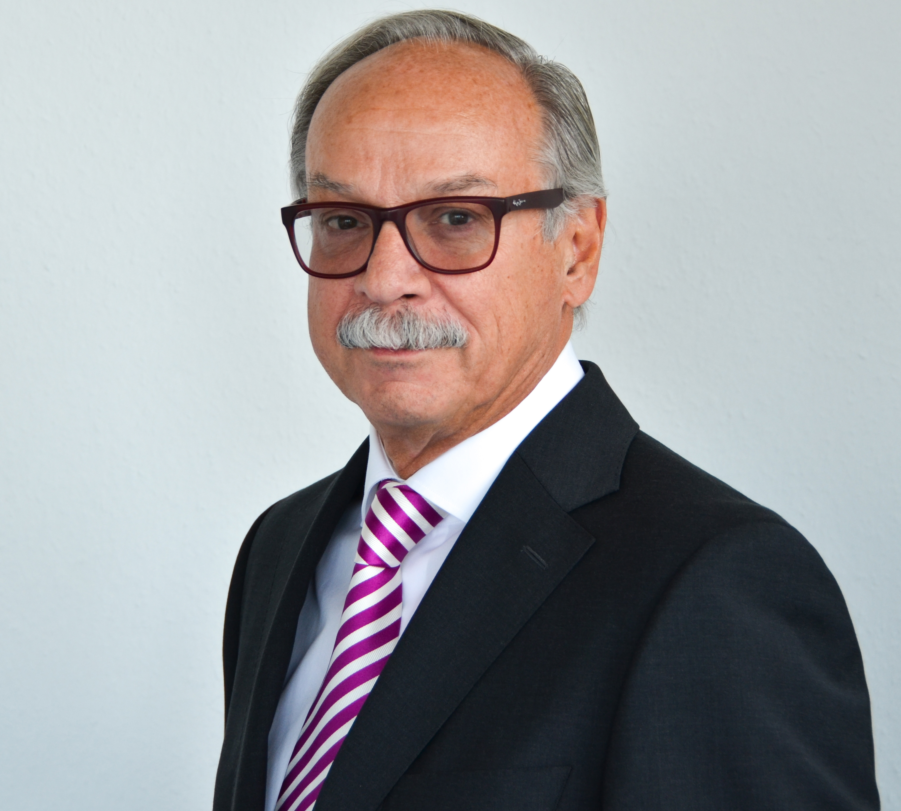 Imagefotografie von Dr. Uwe Böning